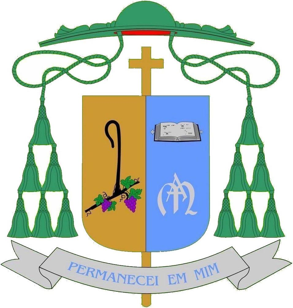 Brasão do Bispo Dom Moacir Silva.